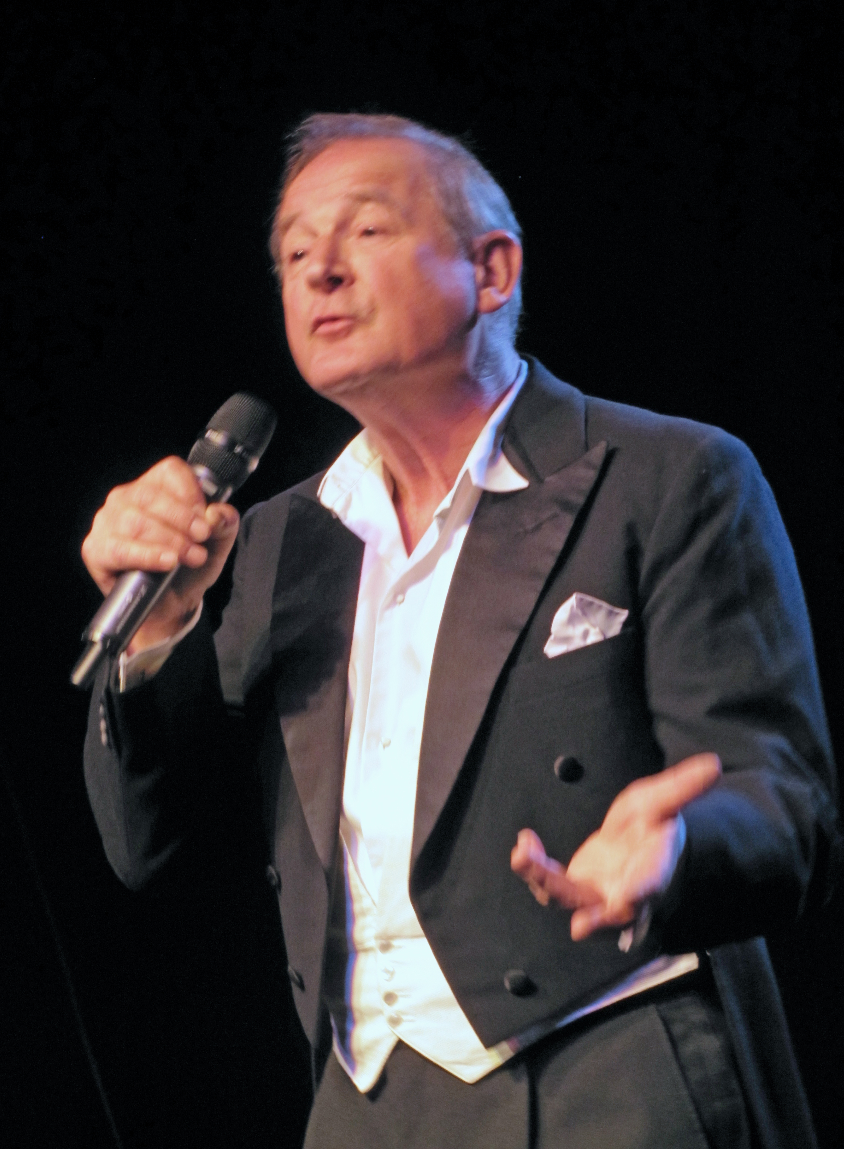 Burghart Klaussner, als Sänger. 2013 bei Zum Klaussner, die musikalische Reisegaststätte der bedenkenlosen Art, in Wiesbaden.